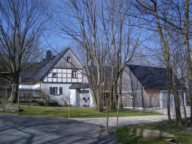 Frackdachhaus in Eichenstein (Gemeinde Issigau), ehemaliger fränkischer Bauernhof